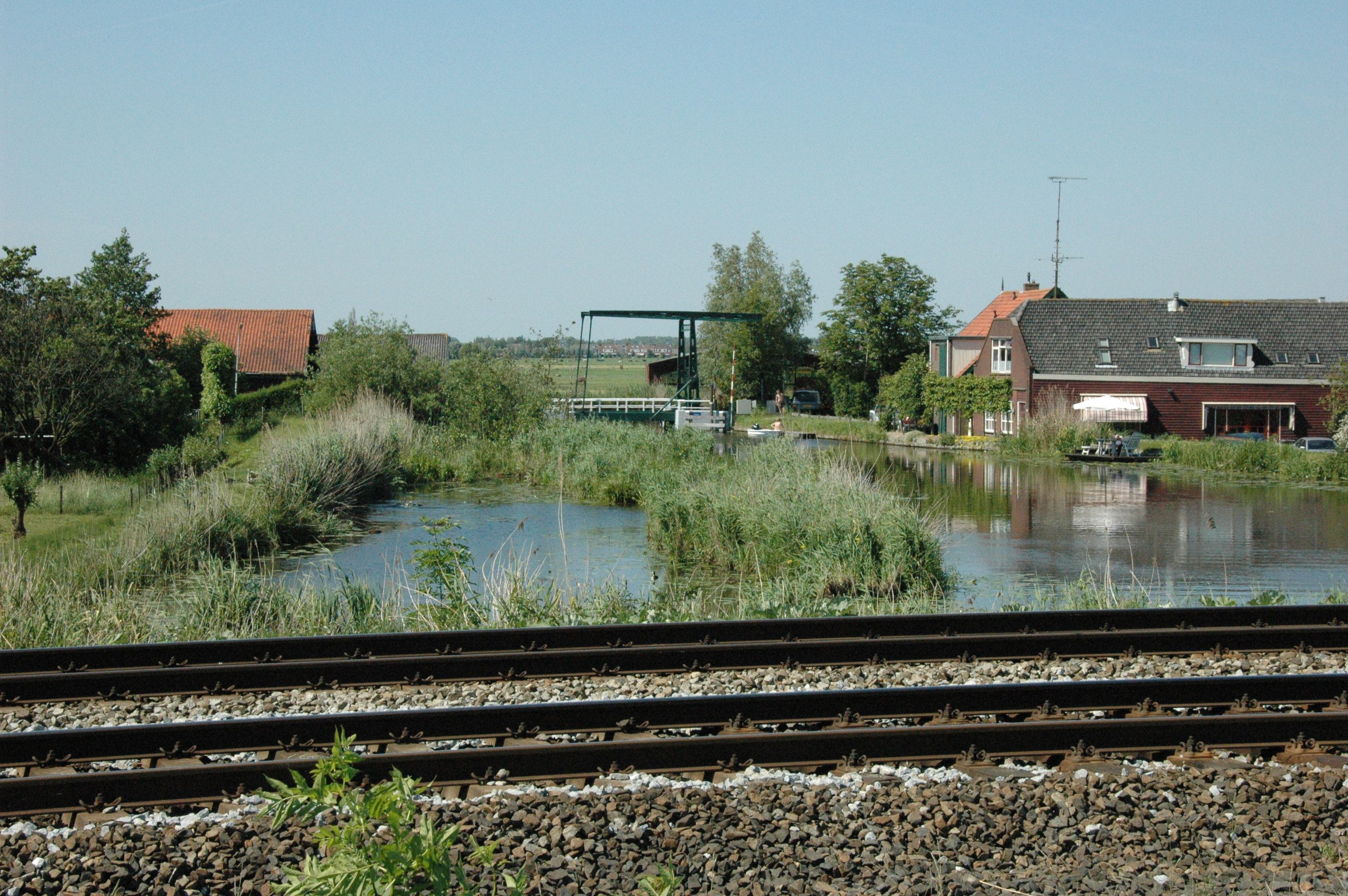 Omschrijving